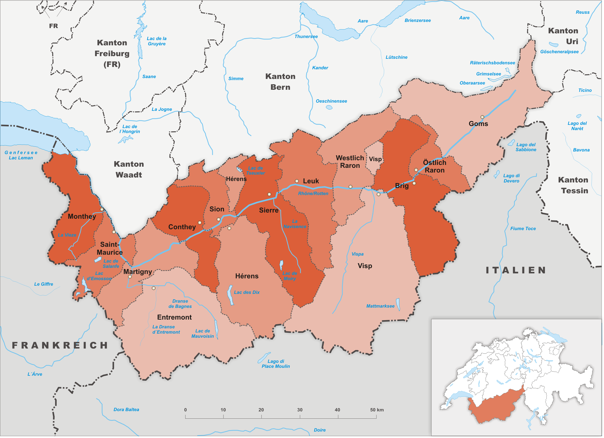 Bezirke des Kanton Wallis.